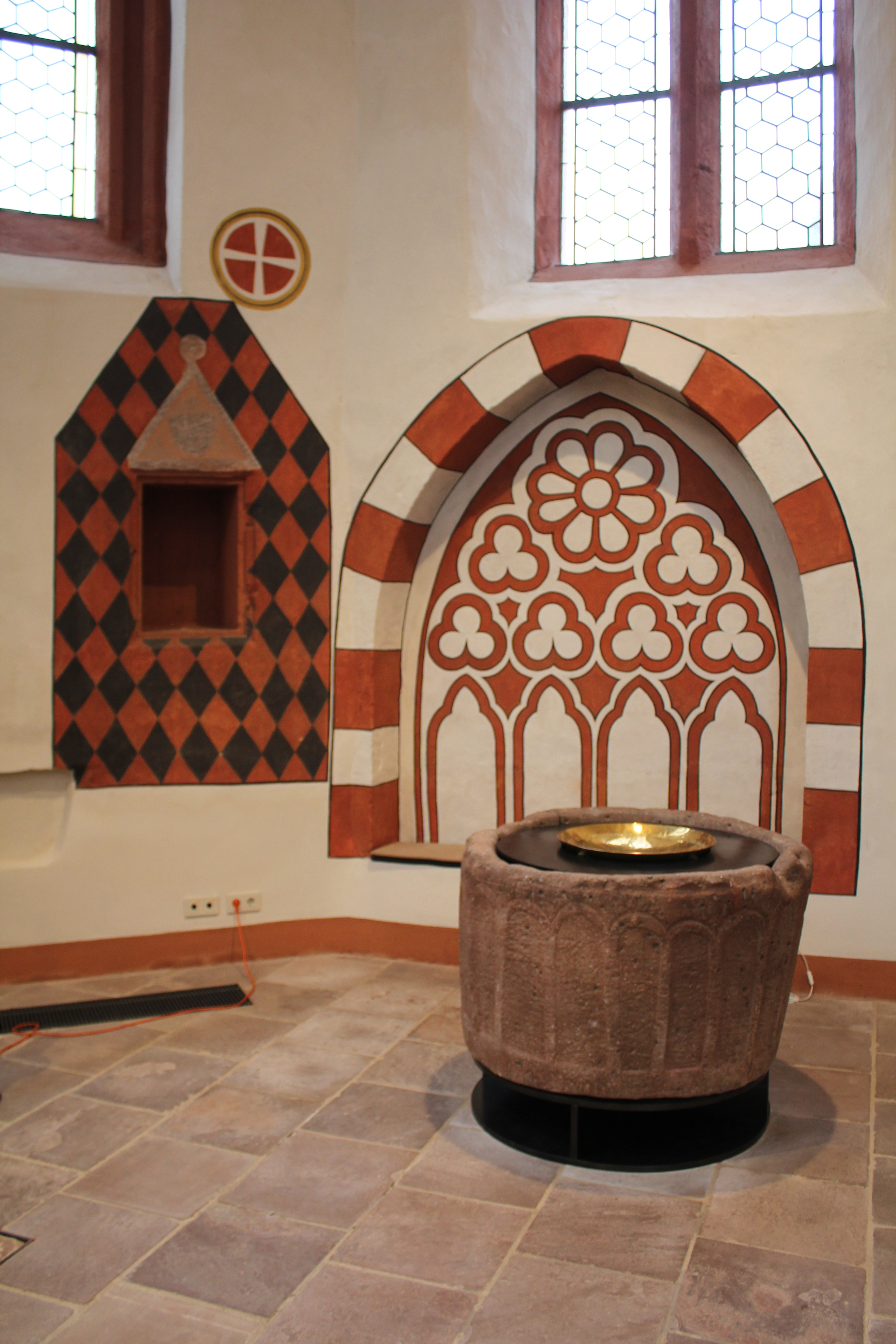 Evanglische Kirche Rüdigheim (Neuberg), Main-Kinzig-Kreis, Hessen, Deutschland